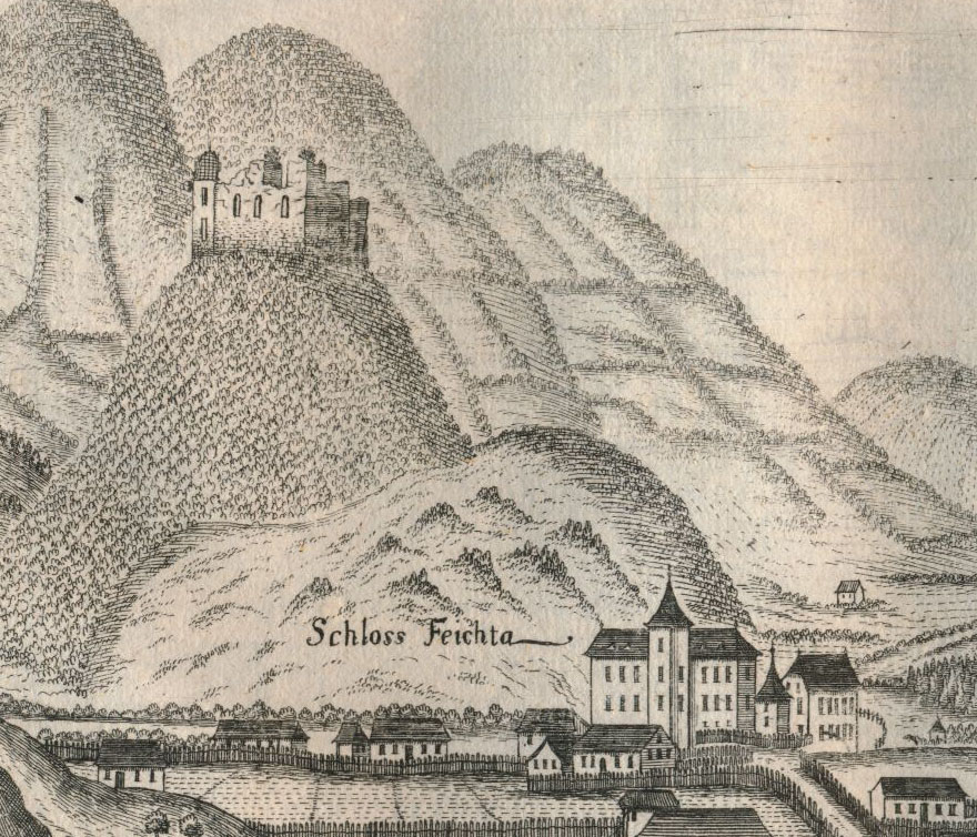 Burgruine Leonstein und Talschloss Feichta. Ausschnitt aus einer Ortsansicht in der Topographia Austriae superioris modernae